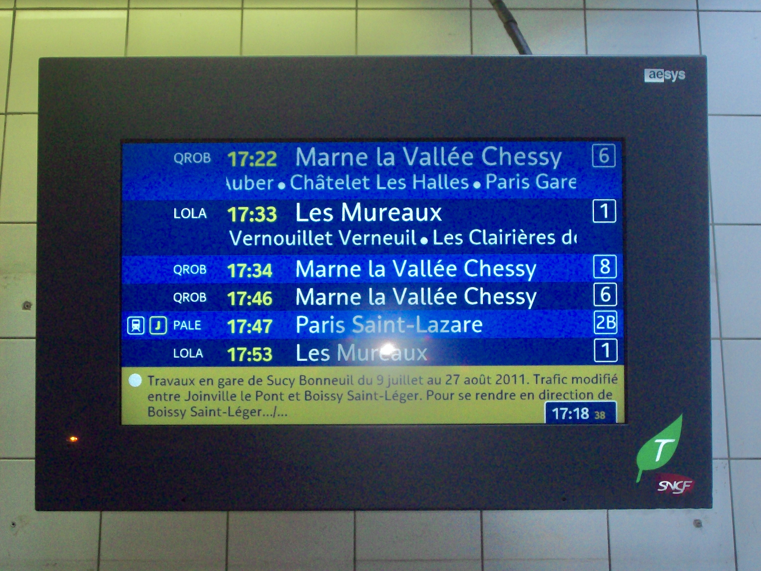 Un autre écran Infogare à Poissy.